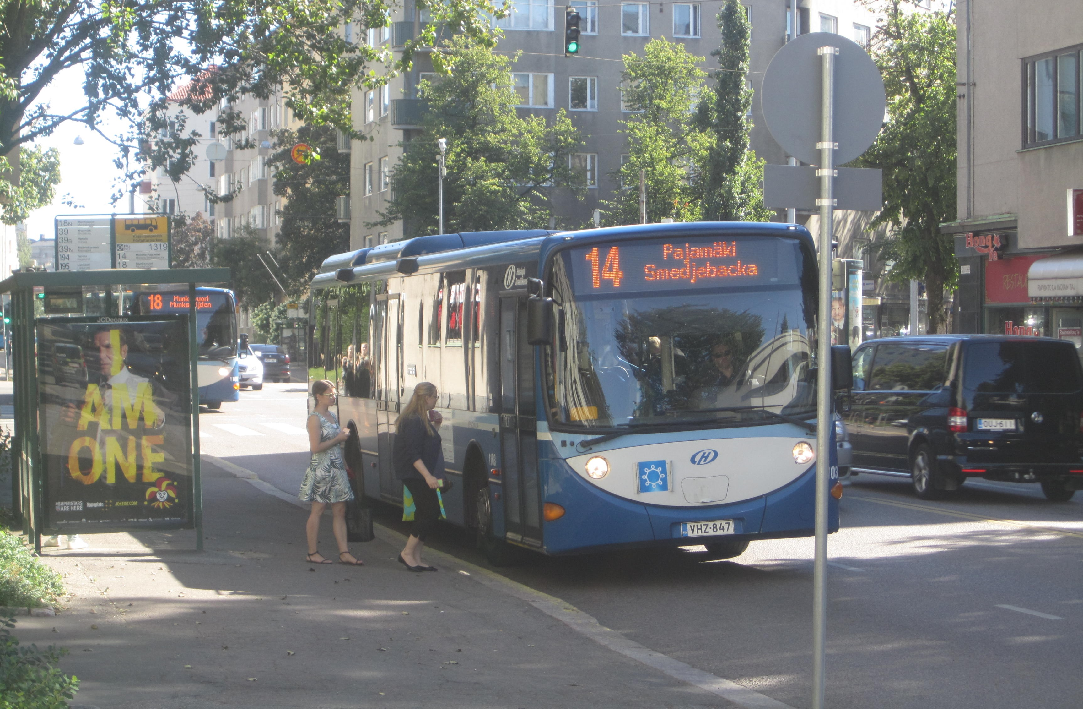 Linjan 14 bussi Topeliuksenkadulla Helsingin Taka-Töölössä.